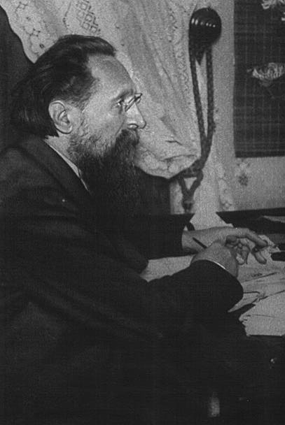 Portrait of Jules Guesde